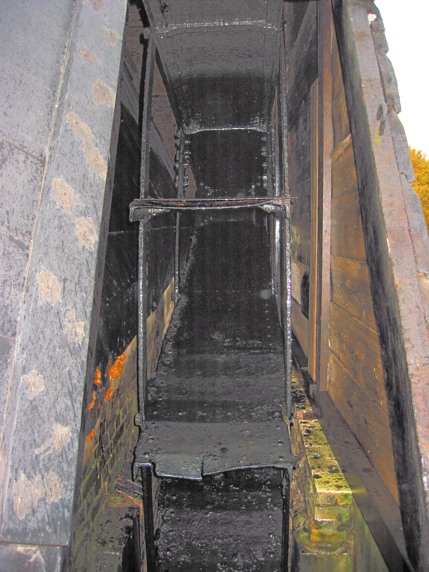 Wipmolen Laaglandse Molen in Hellouw, scheprad, Gelderland, the Netherlands